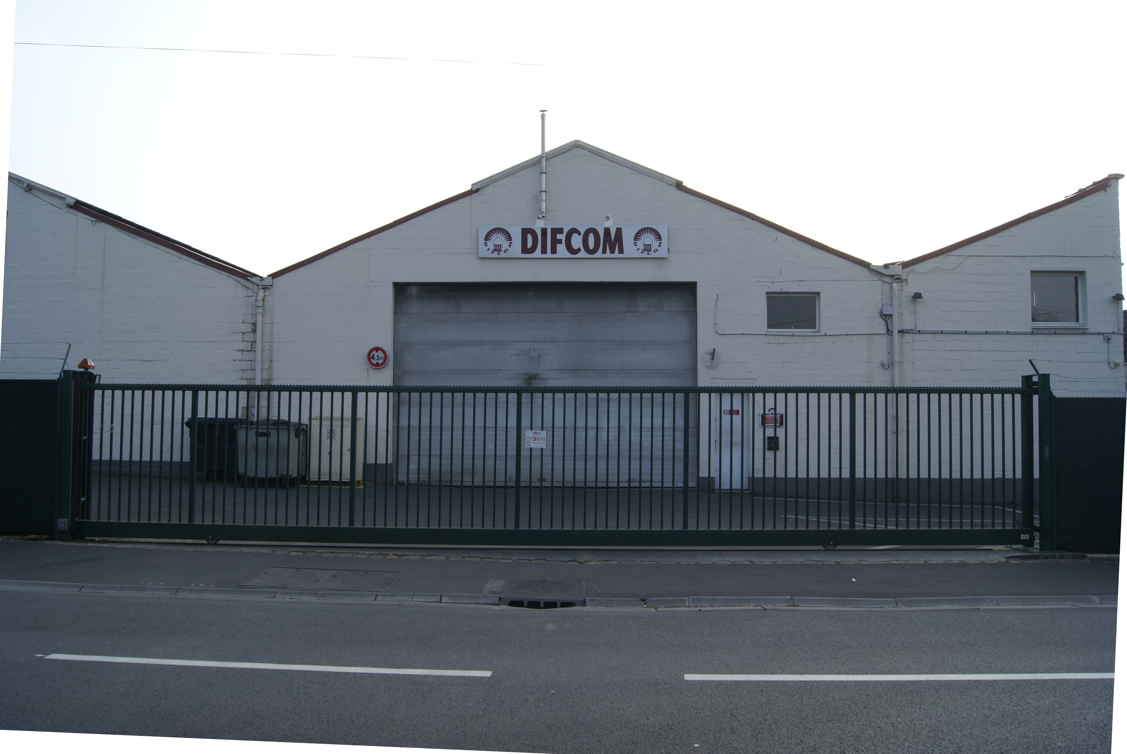 Entrepôts de DIFCOM, Ascq.